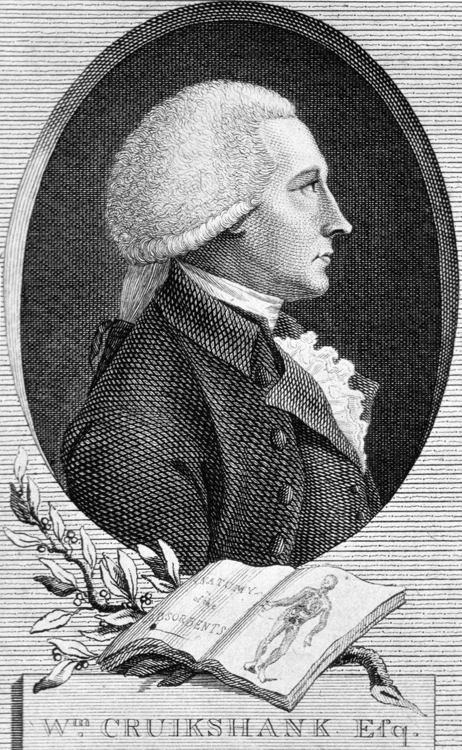 William Cumberland Cruikshank (* 1745 in Edinburg; â€ 27. Juni 1800)